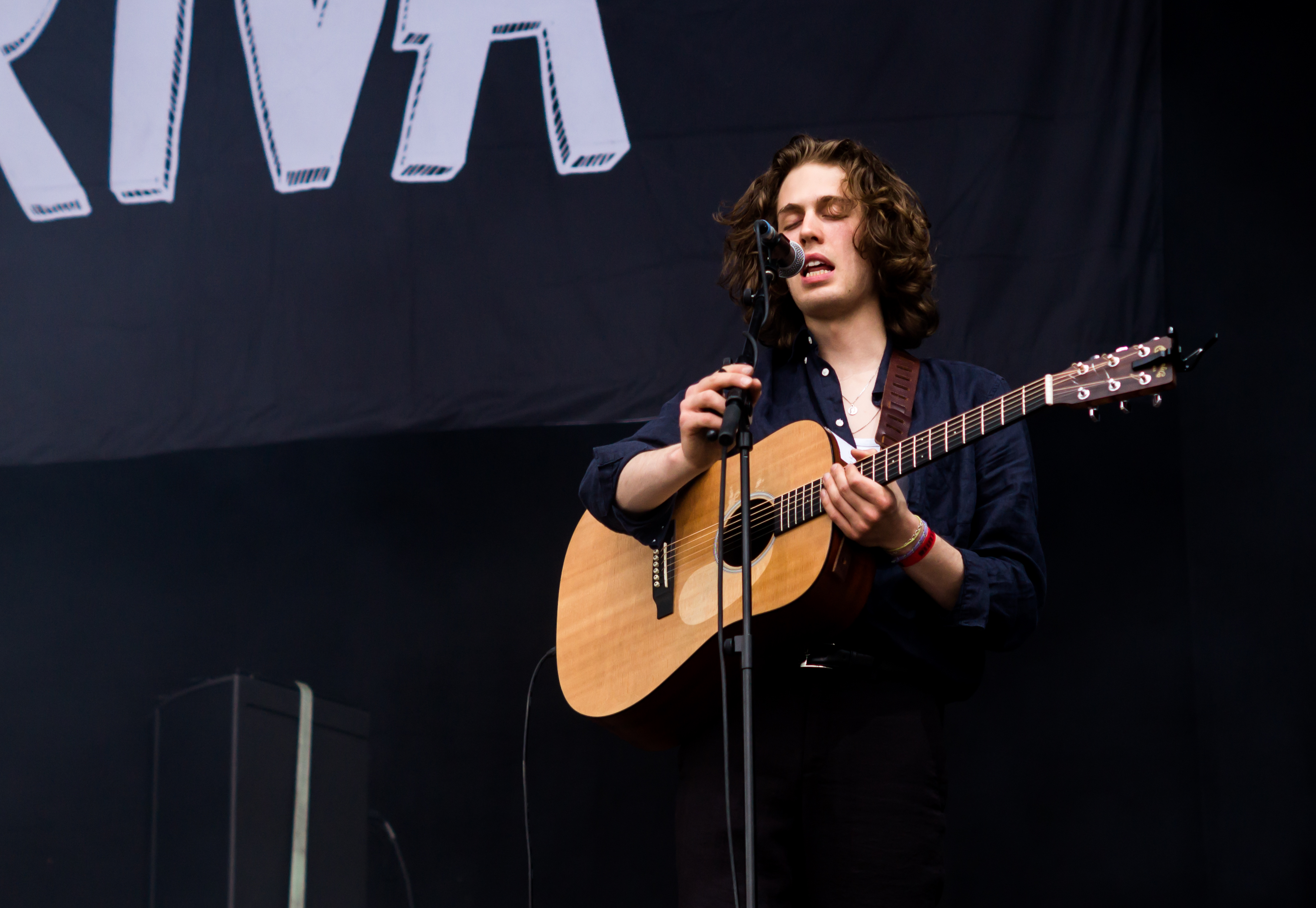 Der Künstler Fil Bo Riva auf dem Kosmonaut Festival 2017 in Chemnitz.